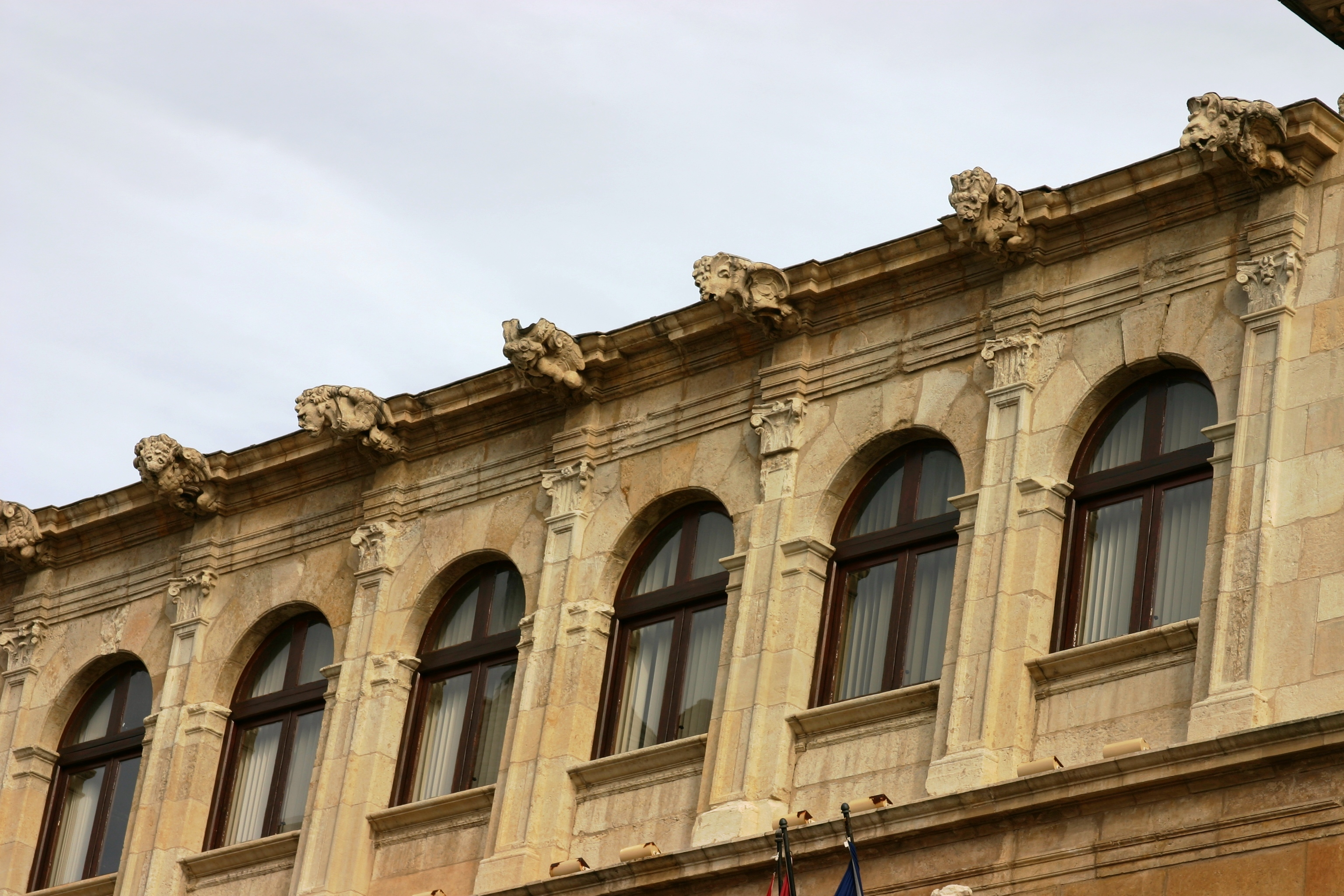 Palácio de los Guzmanes